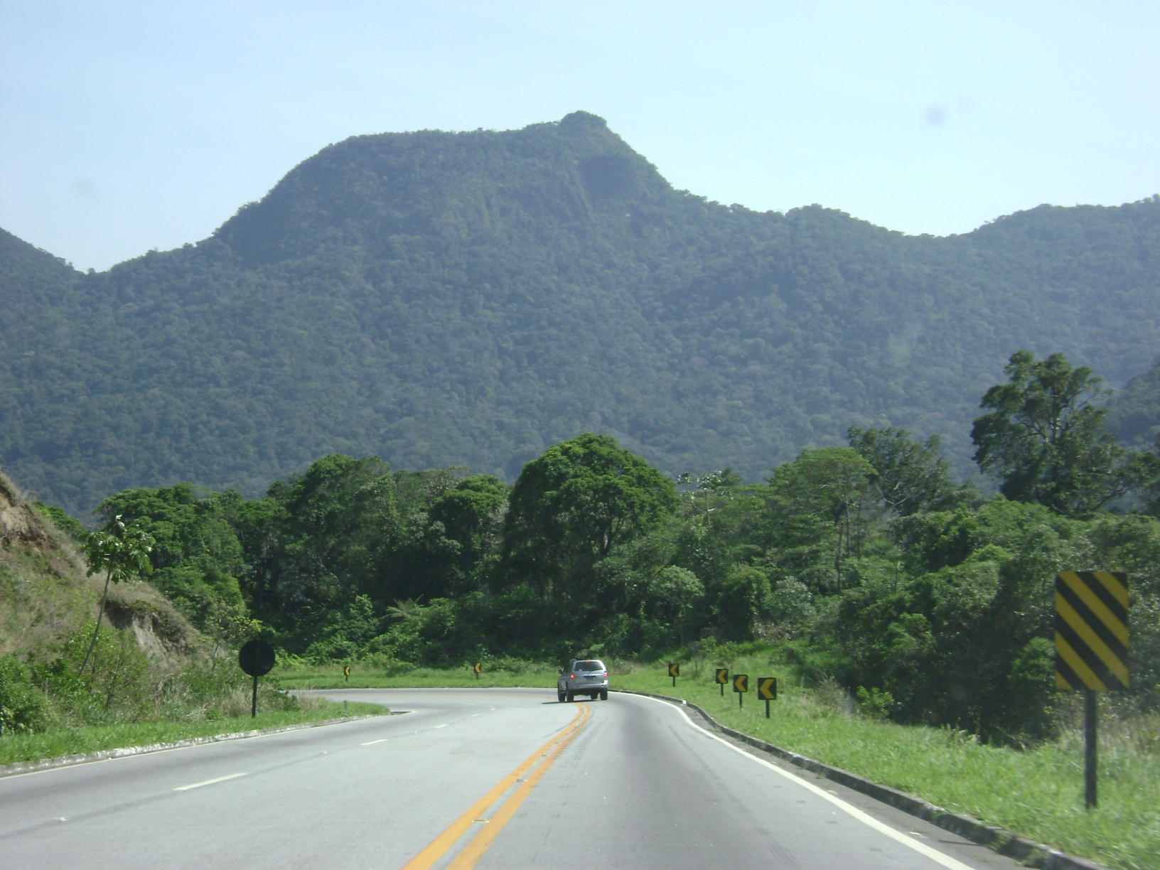 Trecho se serra da Rodovia Mogi-Bertioga (SP-98) em Bertioga, litoral norte paulista.